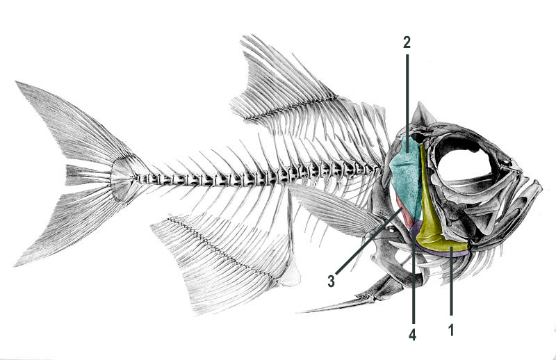 les 4 os du système operculaire du poisson 1) préoperculaire ; 2) operculaire ; 3) sous-perculaire ; 4) interoperculaires. (ici chez Beryx decadactylus (Dessin réalisé à partir de limage ancienne dénommée : File:Beryx decadactylus1.jpg disponible sur wikimedia Commons et "dans le domaine public" ; CC-PD-Mark ; PD Old ; PD-scan (PD-old))